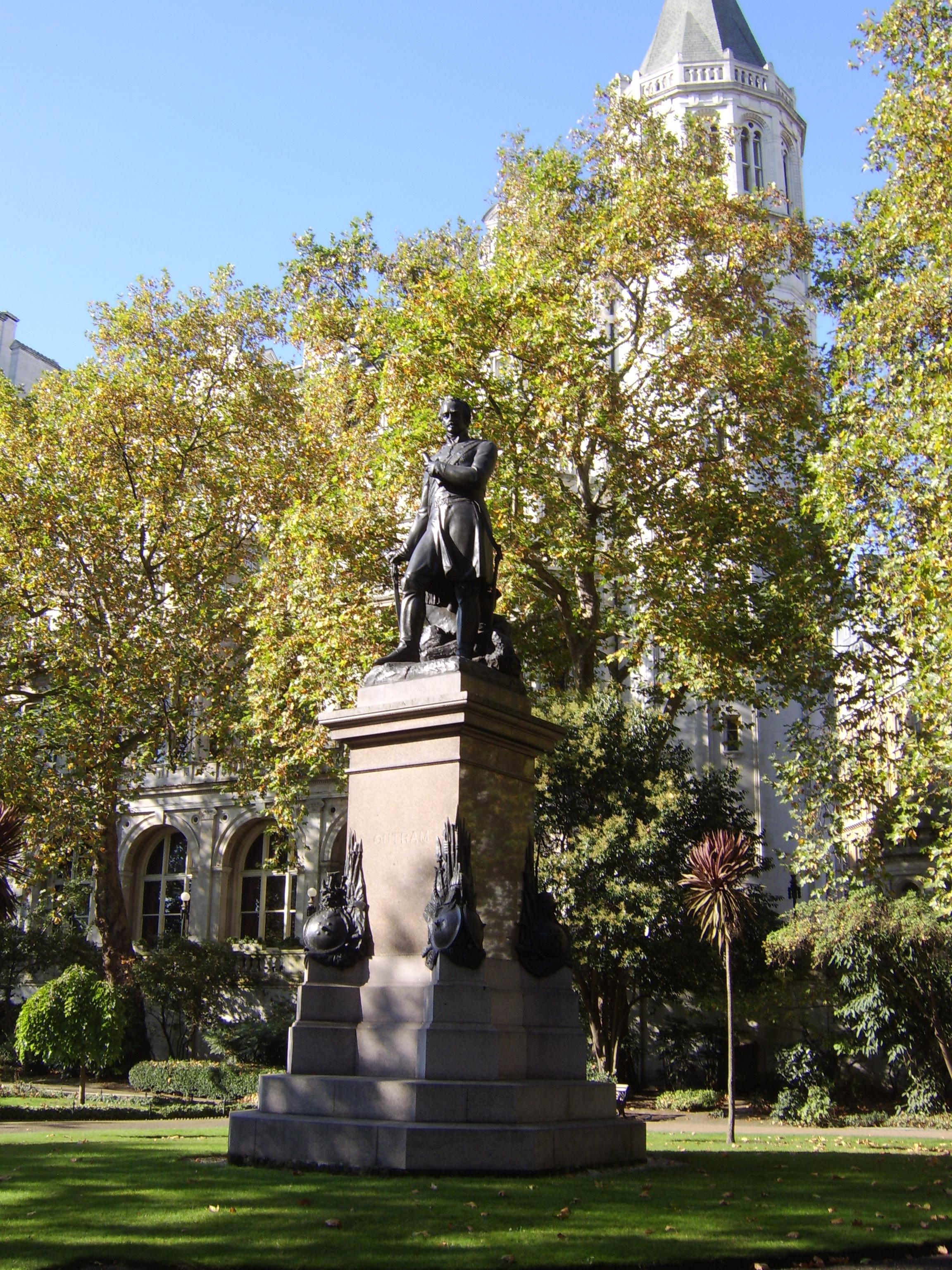 STA71177